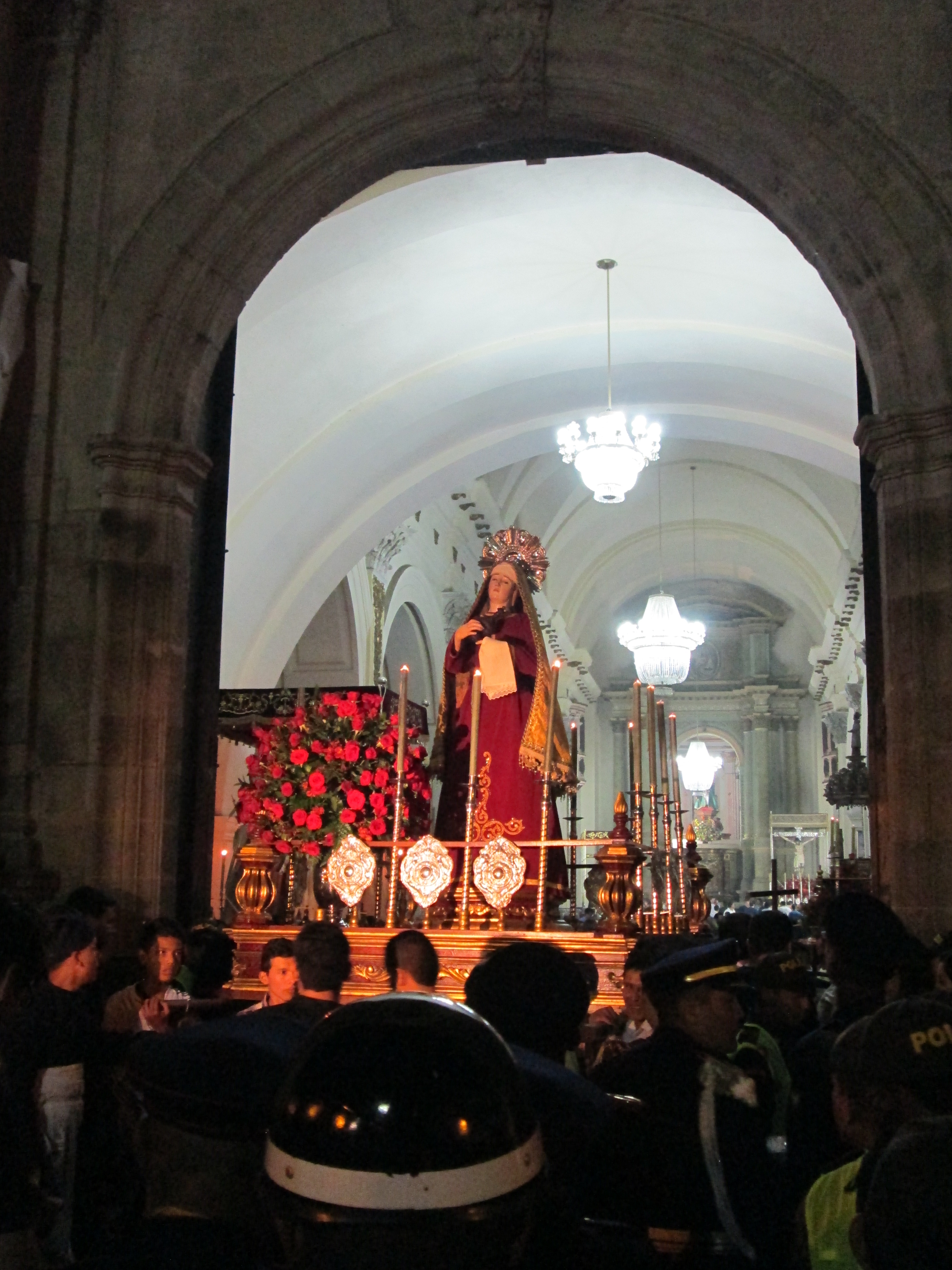 Salida procesional de la iglesia de San Francisco (Popayán Colombia) año 2016. Imagen de Maria Magdalena (imagen española siglo XVIII)